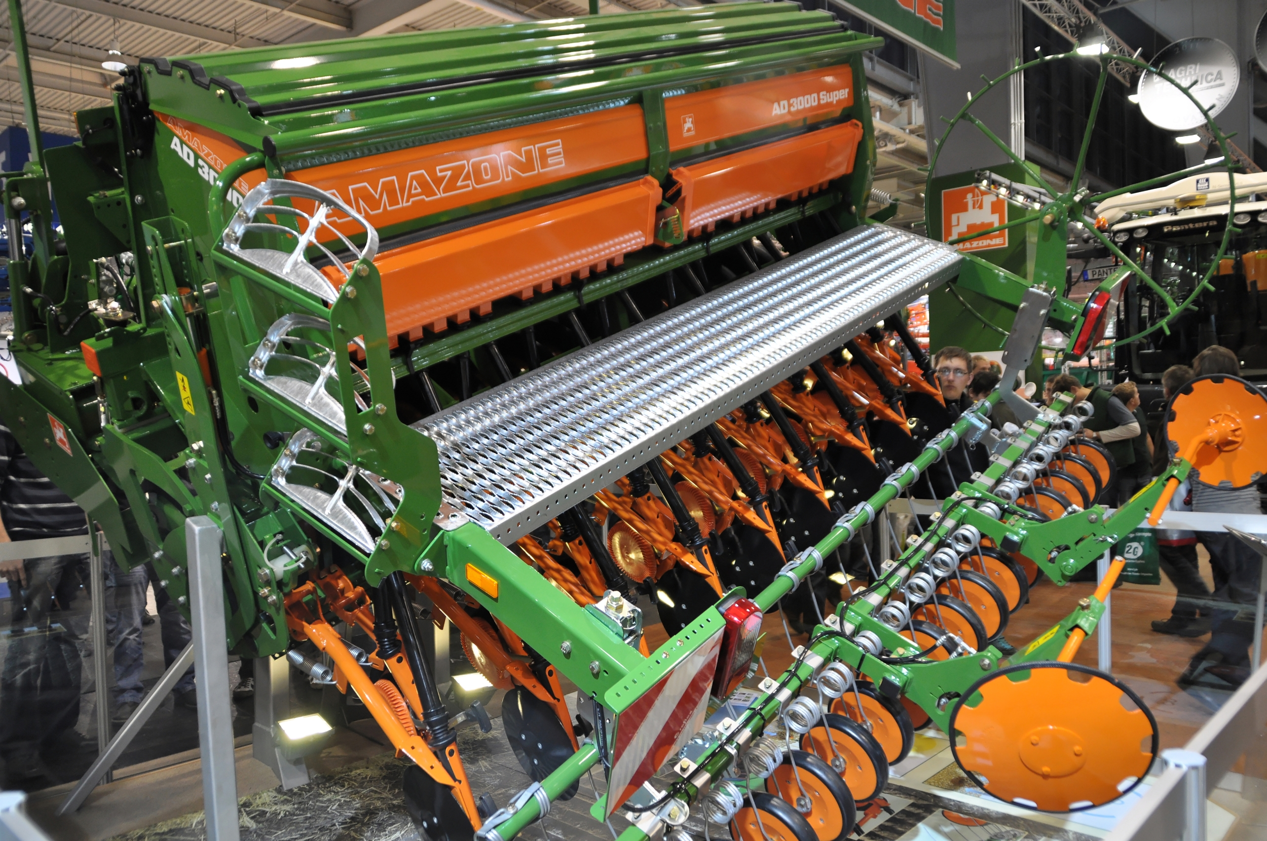 Mechanische Aufbau-Sämaschine AD 3000 Super von Amazone, Agritechnica 2011 Dieses Foto entstand durch die Mithilfe der Wikimedia Deutschland e. V. bei der Akkreditierung als Fotograf. Wikimedia Deutschland e. V. hilft den Freiwilligen der Wikipedia bei der Erstellung von freien Inhalten.